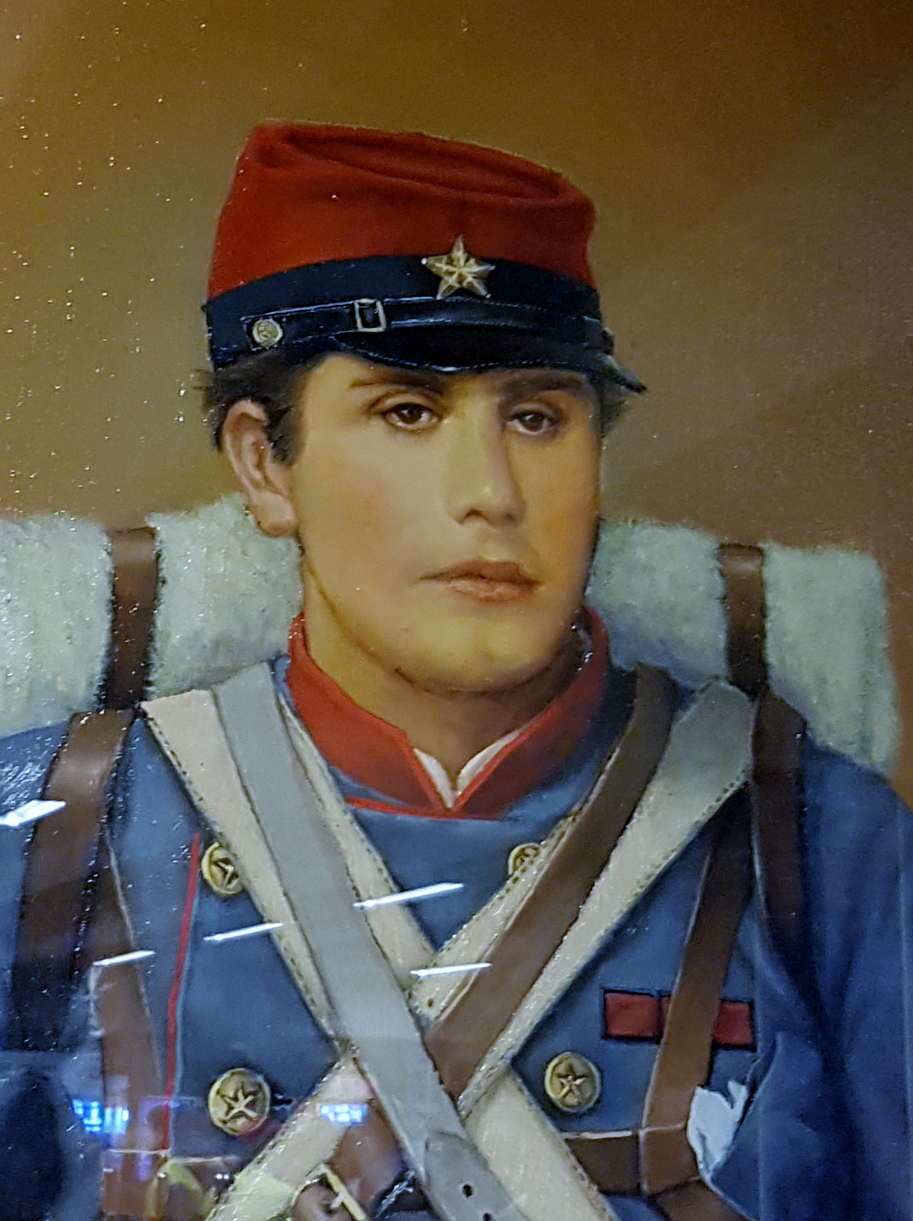 A los héroes de La Concepción, serie de cinco cuadros del pintor Manuel Espinosa Salas instalados en la estación Los Héroes del metro de Santiago de Chile. En la foto, detalle del retrato del oficial Luis Cruz Martínez ubicado ante las escaleras que dan al andén en dirección a San Pablo.